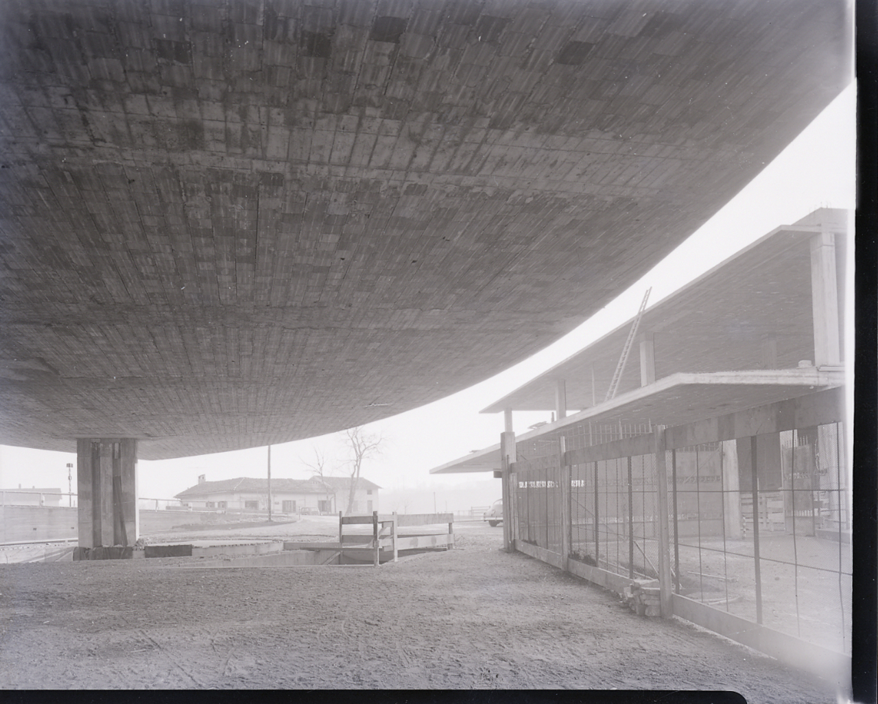 Varese. Architetto Luigi Moretti, Complesso per uffici della Società anonima Pellami (Comacini) e Plastico. Servizio fotografico : Varese, 1958 / Paolo Monti. - Buste: 15, Fototipi: 17 : Negativo b/n, gelatina bromuro d'argento/ pellicola ; 10x12. - ((Serie costituita da 15 buste di negativi identificati con i nn.: 2884, 2885, 2886, 2887, 2888, 2889, 2890, 2891, 2892, 2893, 2894, 2895, 2896, 2897, 2898, 2899, 2900, e tenute insieme da una graffetta. - Le buste sono numerate da 22 a 36. - Buste e negativi incurvati. - Fonte: Rubrica di Paolo Monti: Archivio 10x12 (ultimi numerati) - dal G1 al (s.d.), presso Archivio Paolo Monti